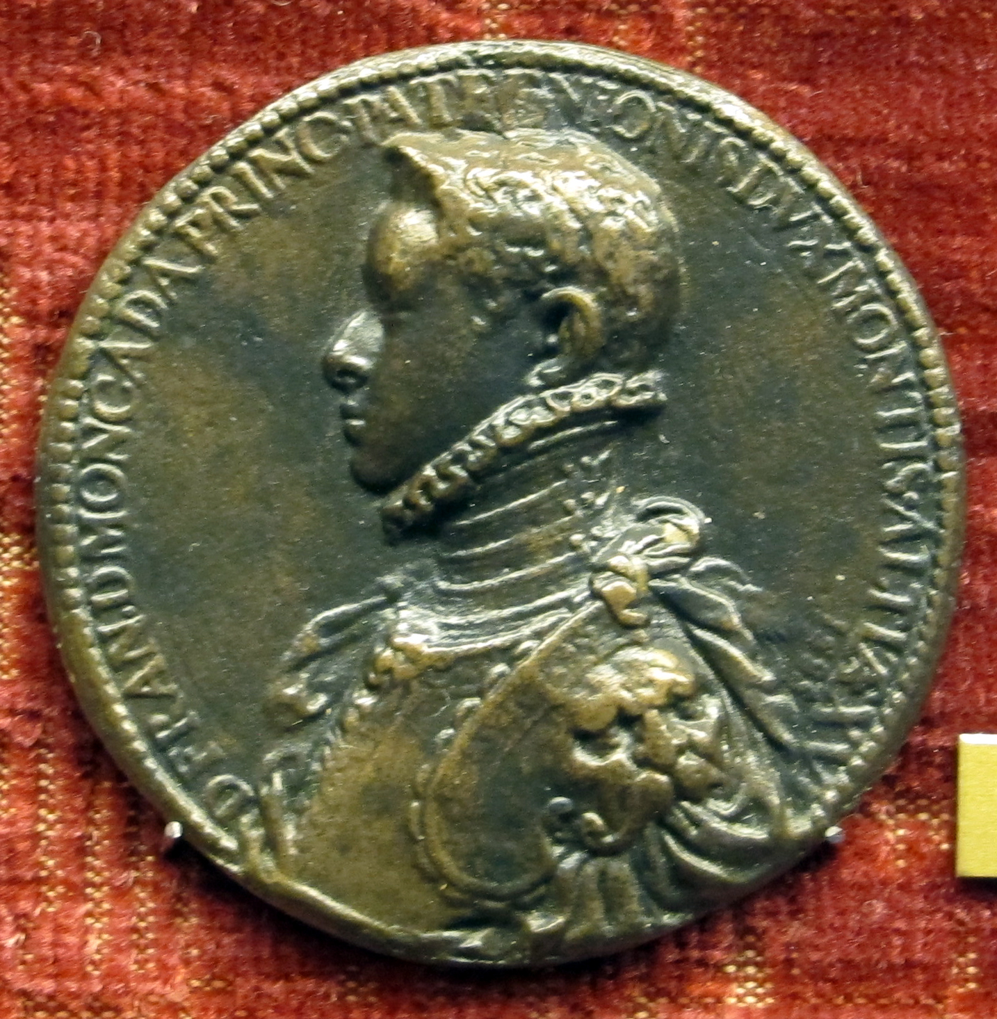 medaglia di autore anonimo